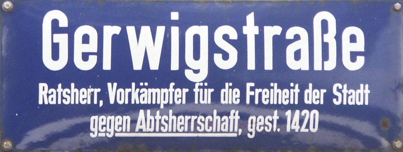 Straßenschild der Gerwigstraße mit Kommentar